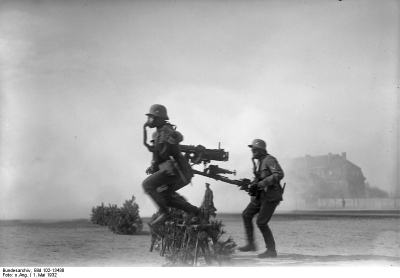 Ein grosses Sportfest der Reichswehr fand am 1. Mai in Berlin-Lankwitz statt ! Reichswehrsoldaten beim Hindernislauf mit Gasmasken und schwerem Maschinen-Gewehr springen über eine Hürde im vernebelten Gelände.